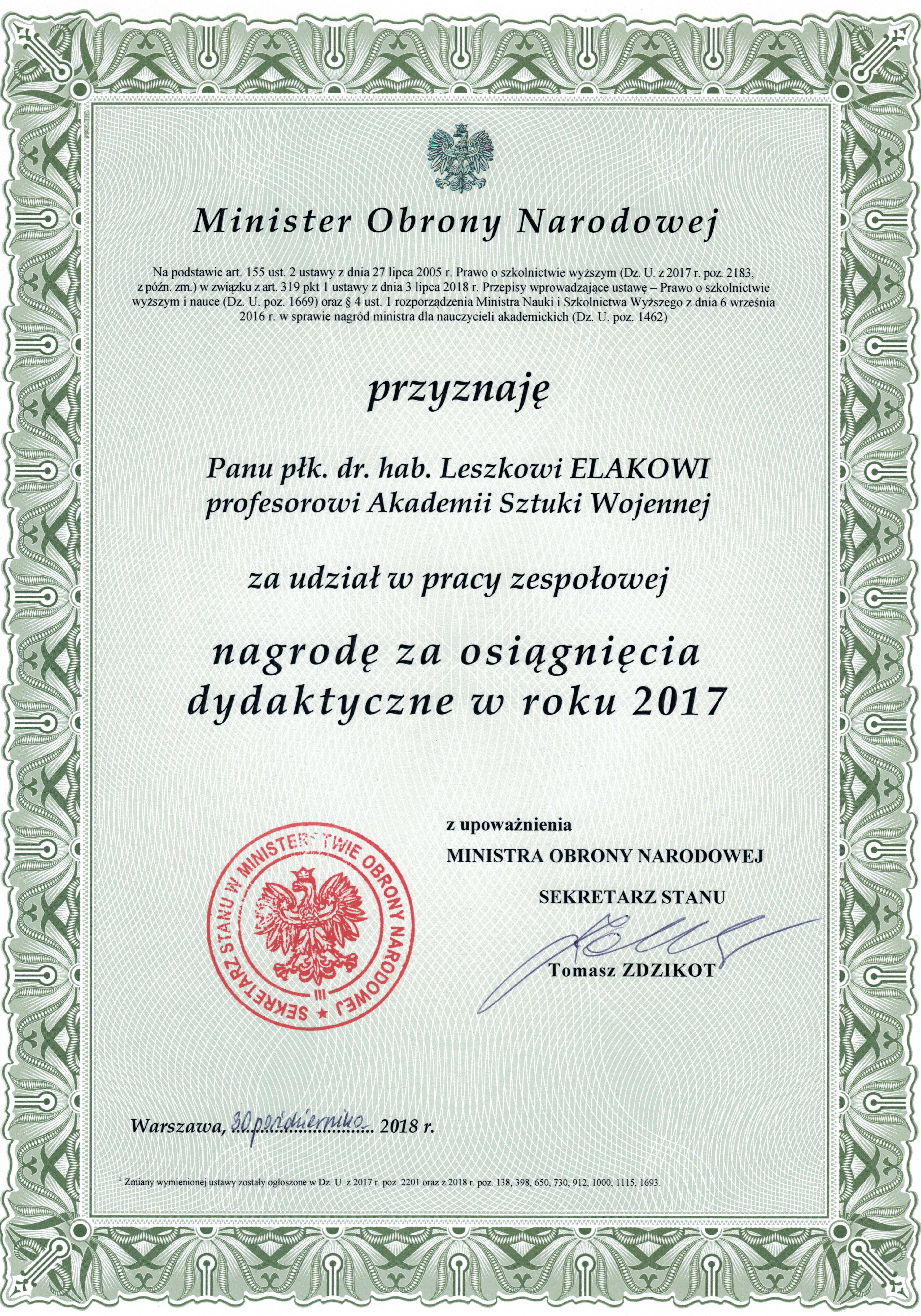 Skan dokumentu potwierdzający otrzymanie nagrody od Ministra